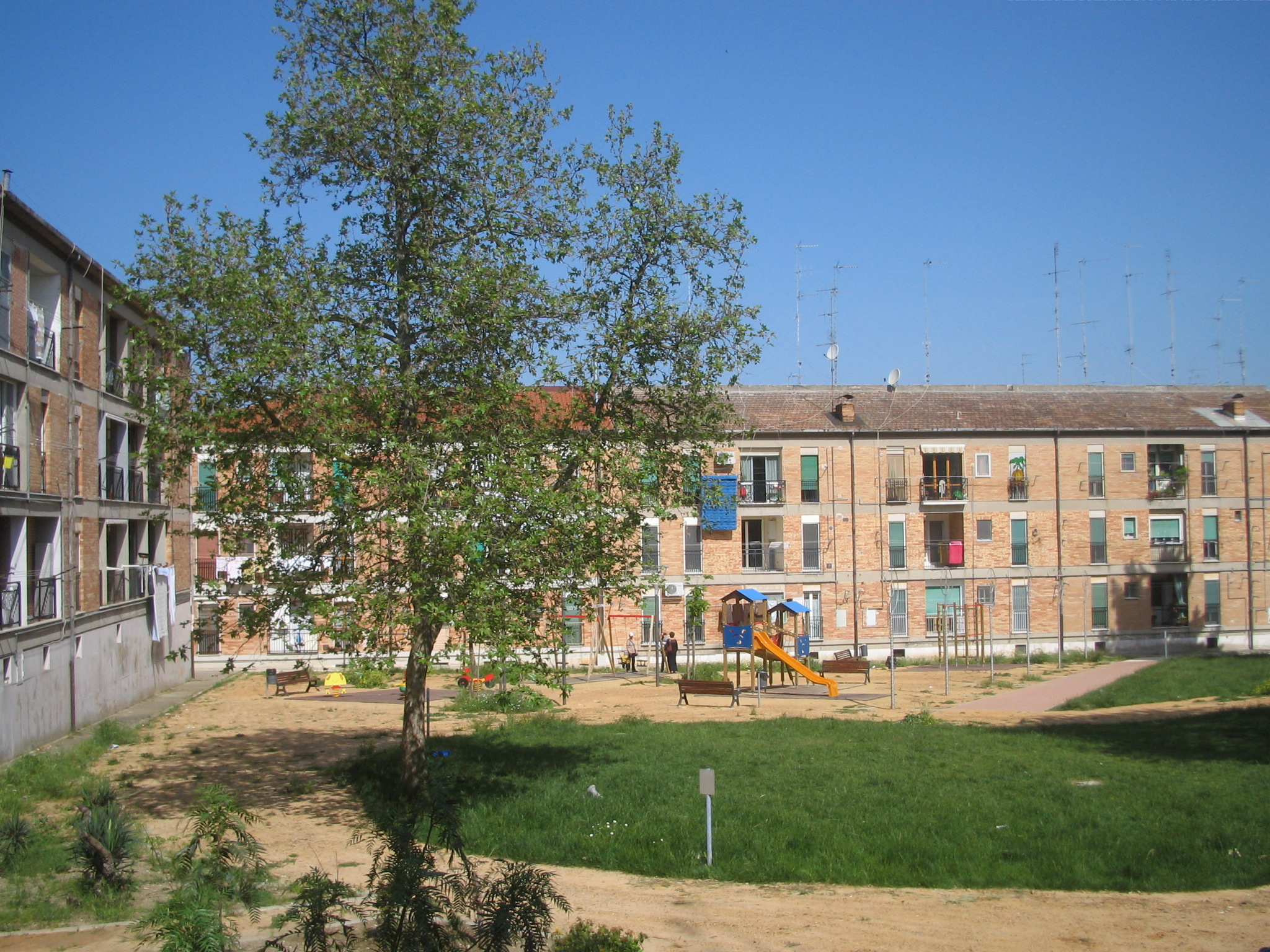 Parco giochi al rione Spine Bianche di Matera, espressione del neorealismo architettonico italiano del secondo dopoguerra.